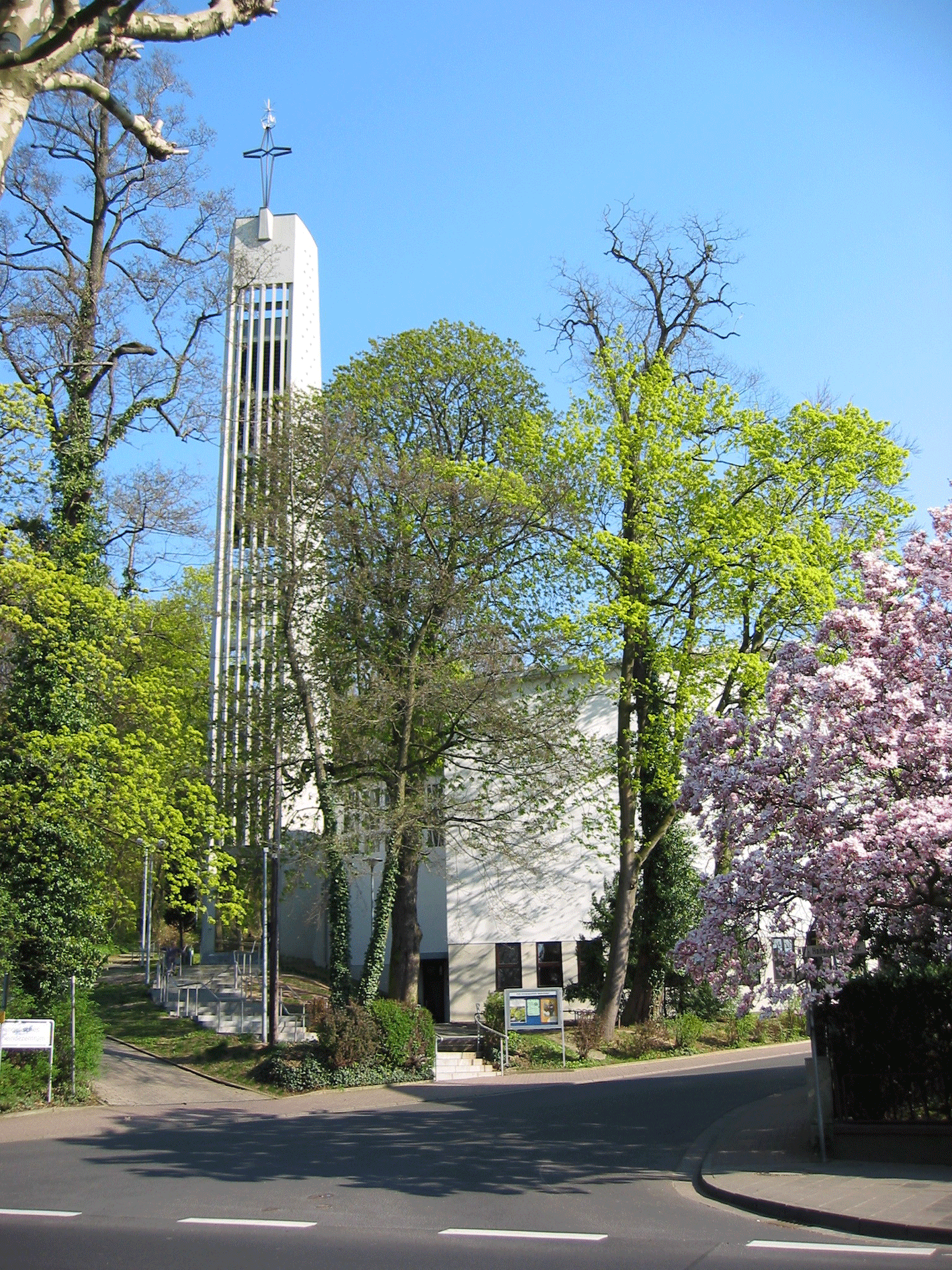 Katholische Pfarrkirche Maria Königin zu Meerholz Hailer, Diözese Fulda, Main-Kinzig-Kreis, Hessen, Deutschland. Architekt: Reinhard Hofbauer 1959